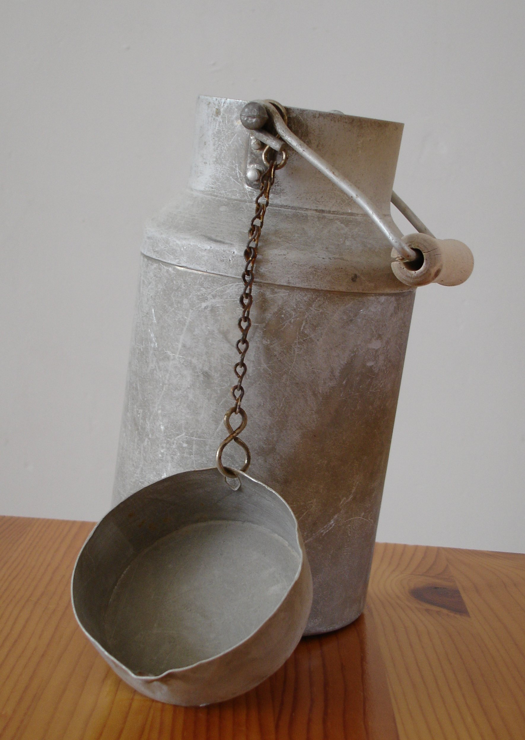 Broc à lait / milk jug